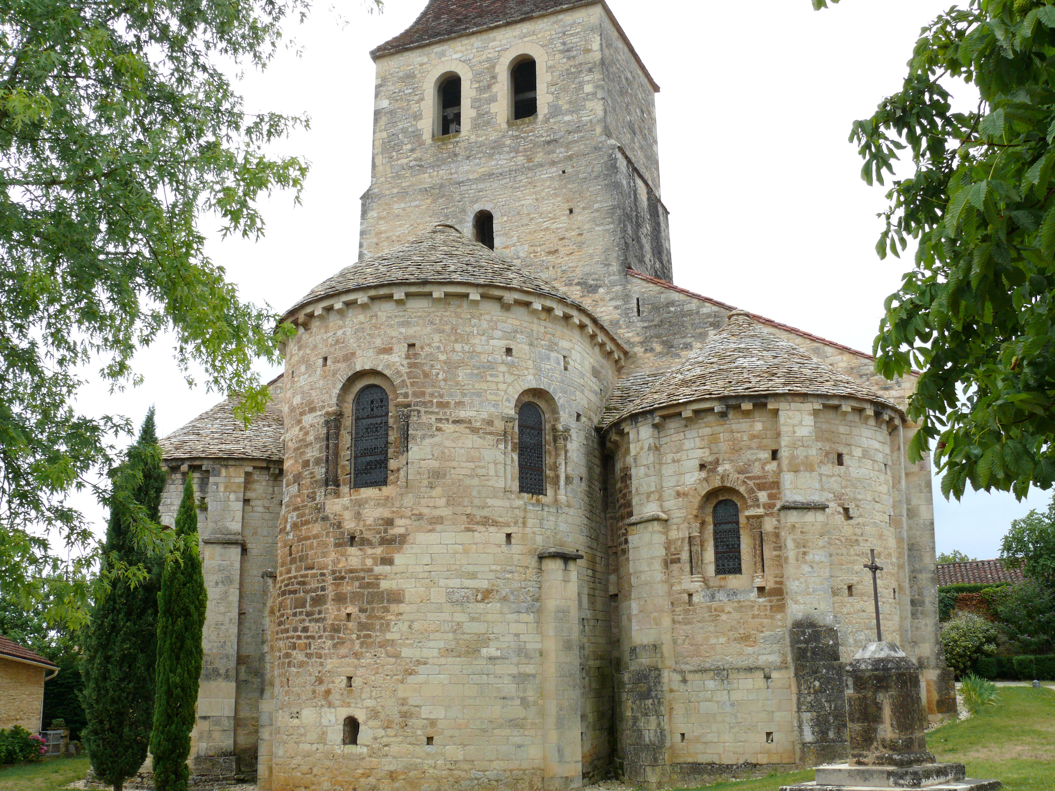 Les Arques - Église Saint-Laurent - Le chevet